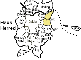 Kort der viser Sakild Sogn, Hads Herred, Århus Amt, Denmark.